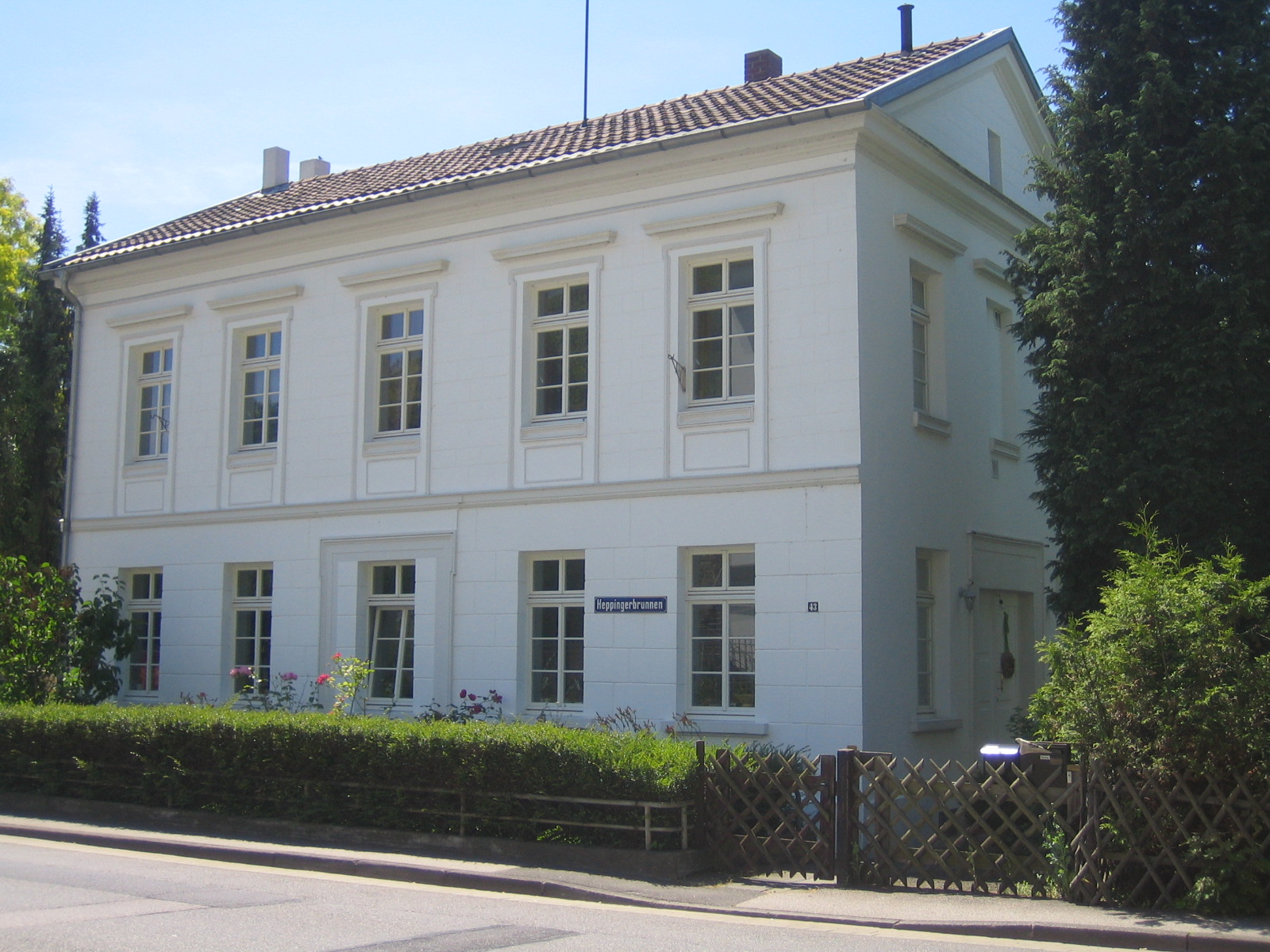 Brunnenhaus alter Heppinger Brunnen